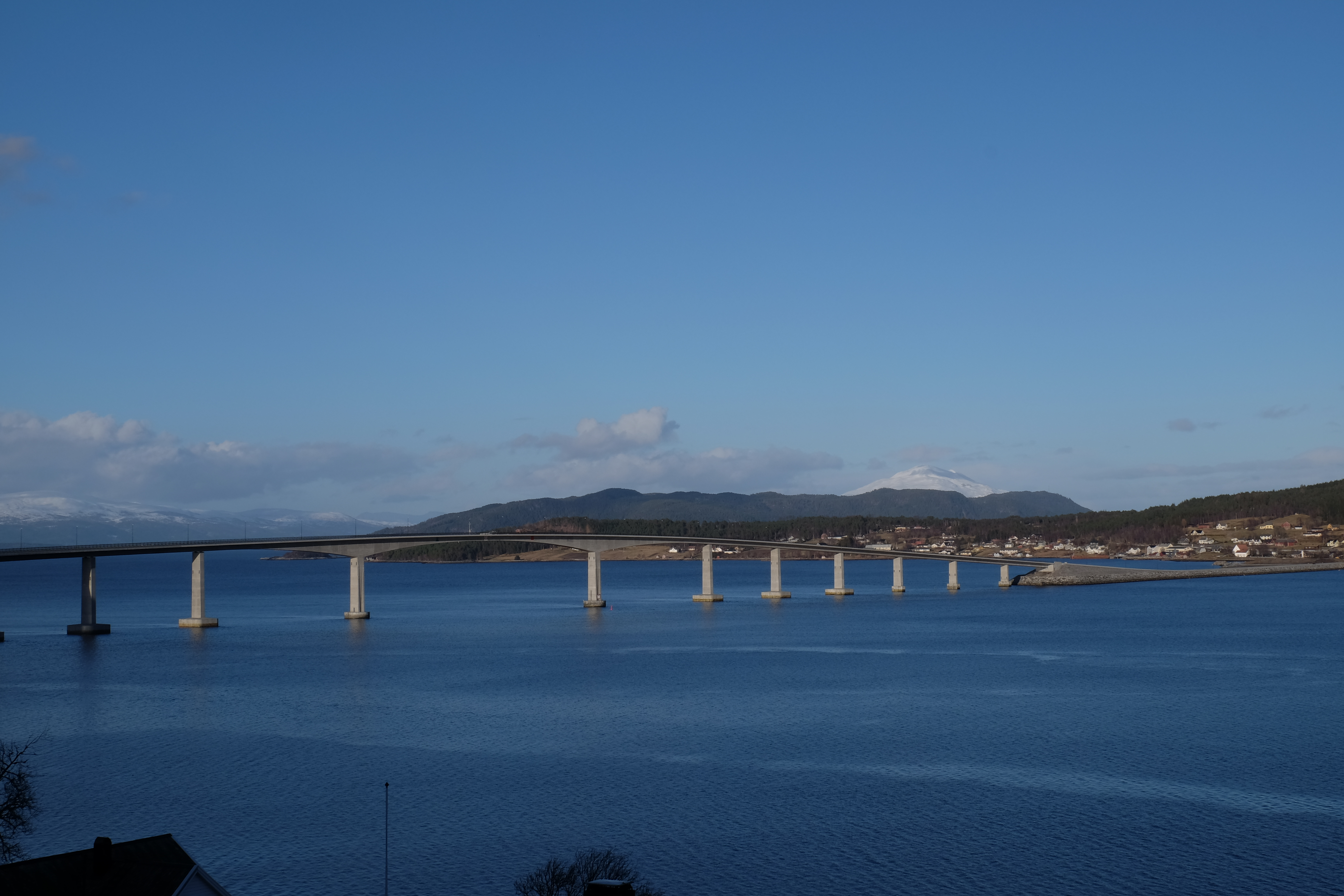 2016-03-25 Tresfjordbrua (1)